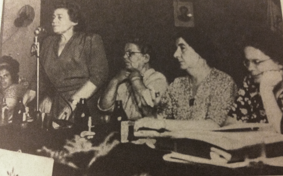 שולמית נושאת דברה במועצת הפועלות. על ידה: בבה אידלסון, גולדה מאיר, עדה מימון